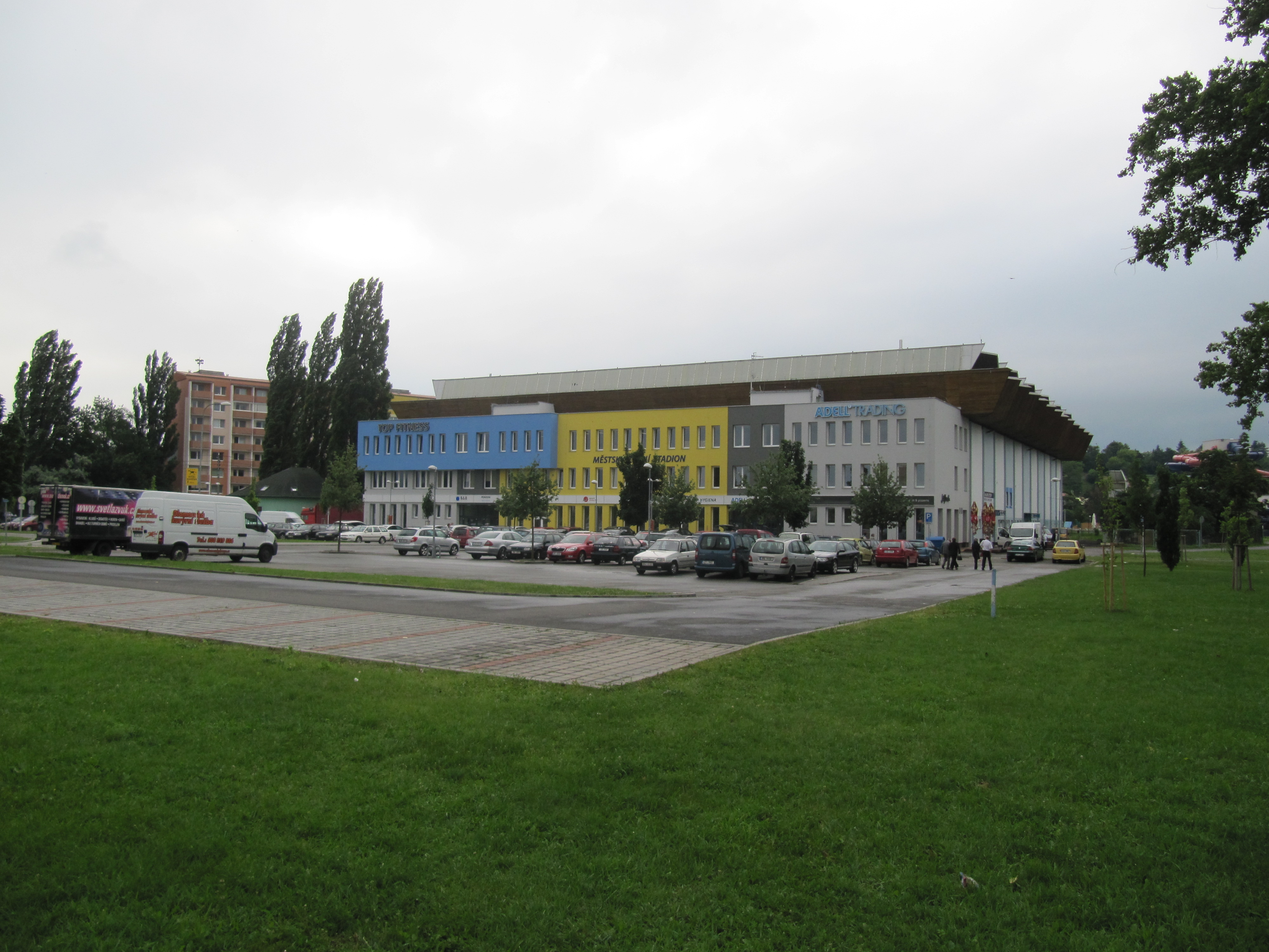 Uherské Hradiště, zimní stadion